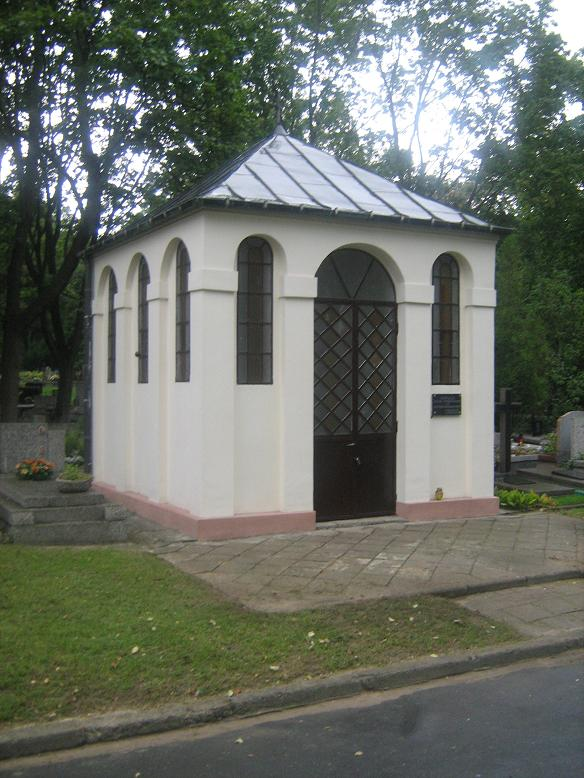 Kaplica Matki Bożej Nieustającej Pomocy na cmentarzu polskokatolickim w Warszawie.